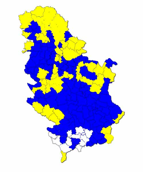 Serbian presidential election, 2008/Élection présidentielle serbe de 2008, 2nd tour